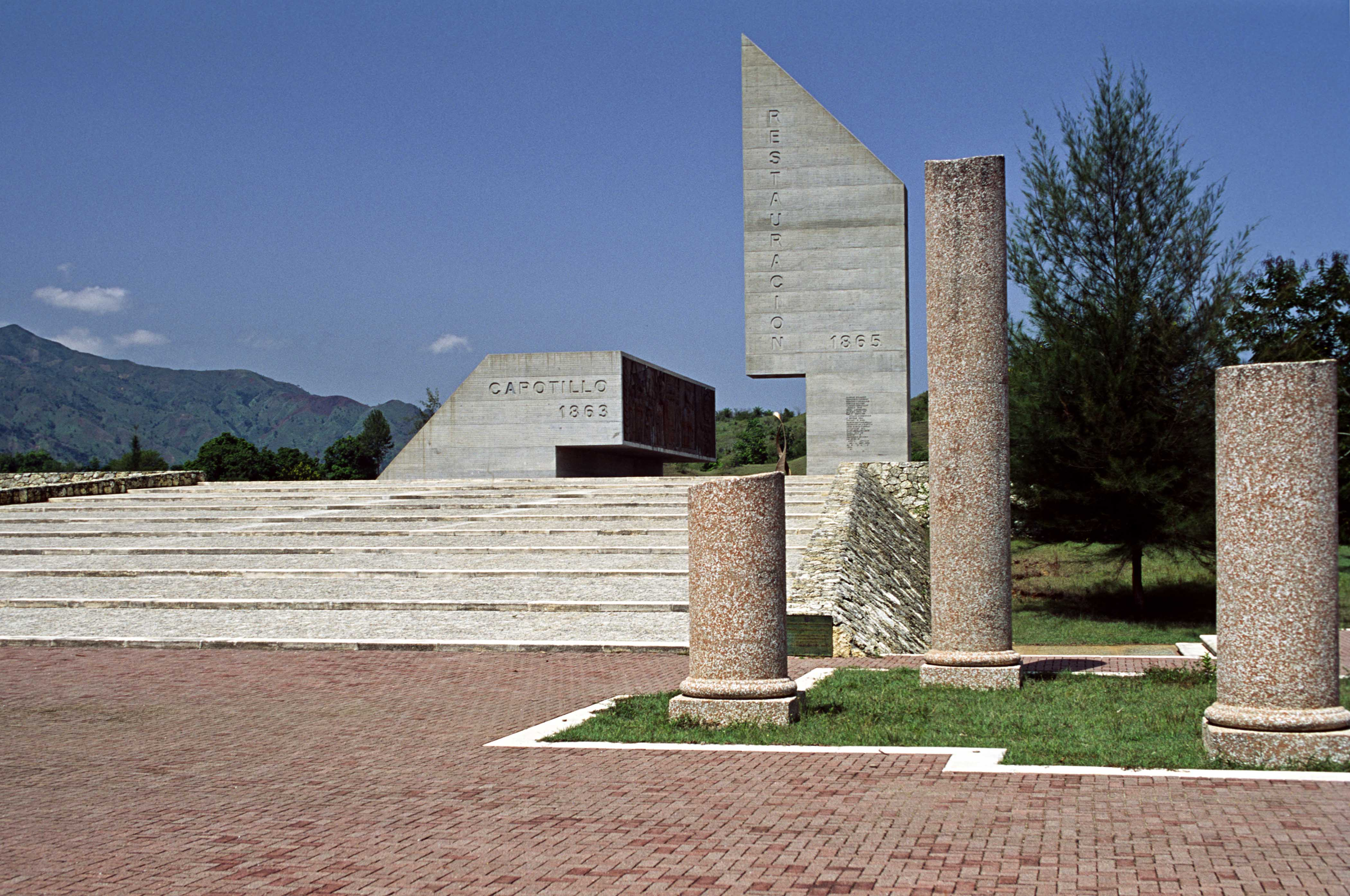 Perspectiva del Monumento a la Restauración de la Replica Dominicana.